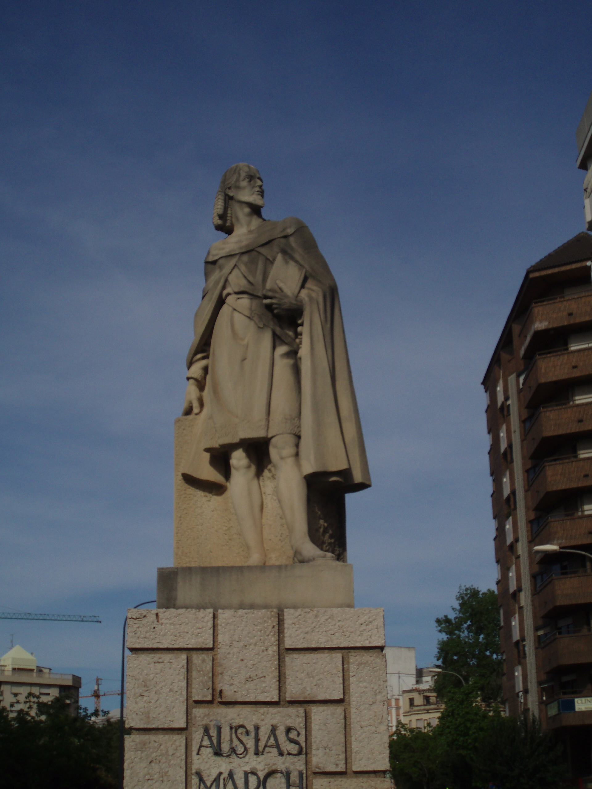 Ausiàs March de José Rausell en Gandia (Valencia, España)